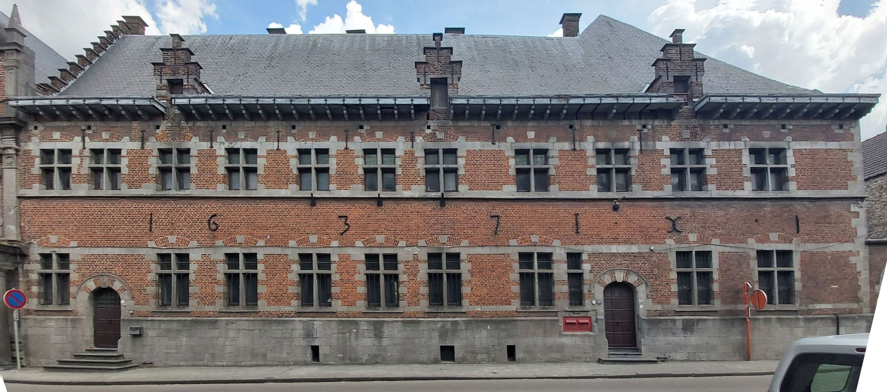 Ancien couvent des Dominicains: façades et toitures (M) ainsi que l'ensemble formé par ces constructions et abords (S)